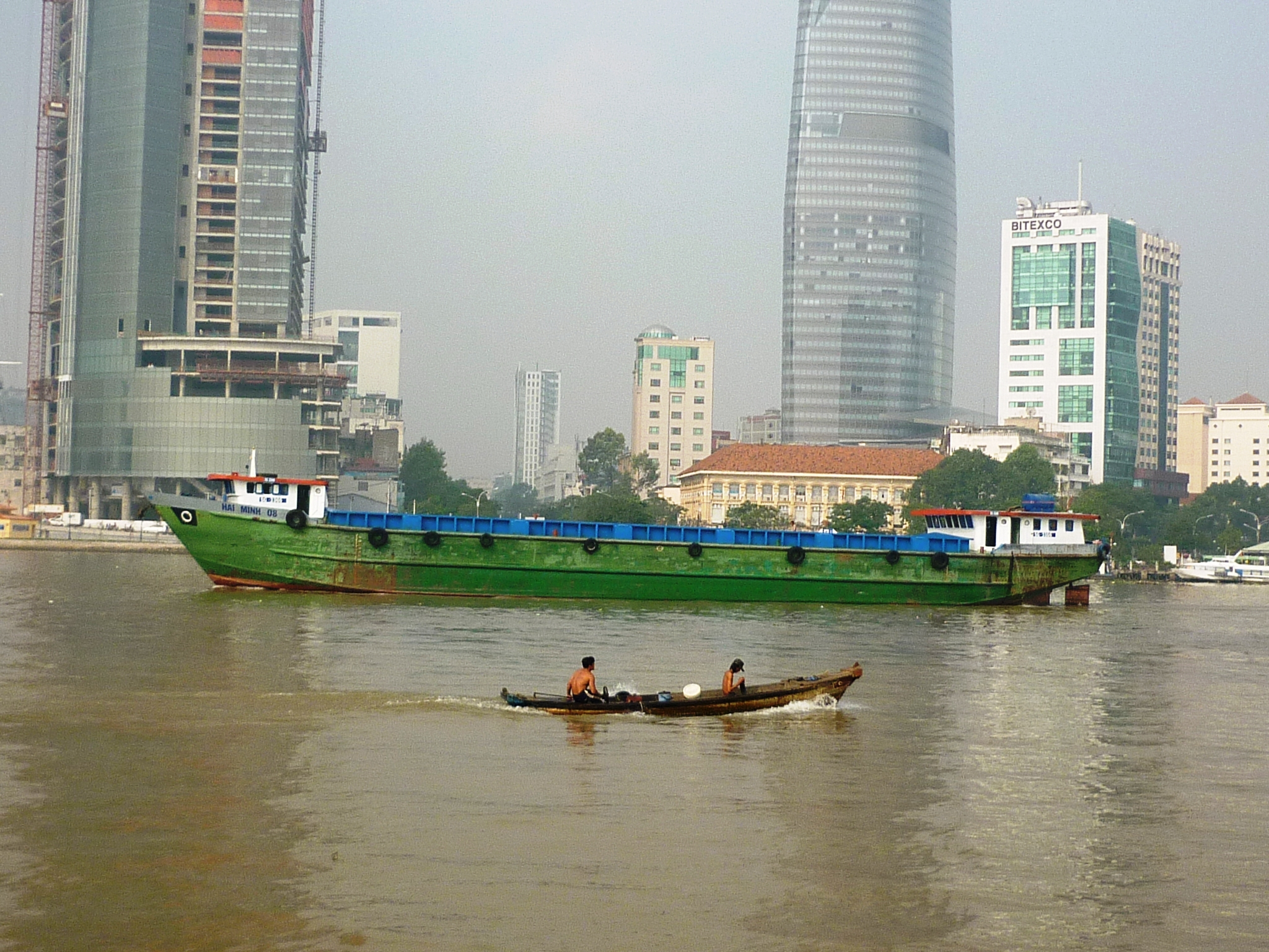 Một chiếc vỏ lãi lướt ngang bến Bạch Đằng trên sông Sài Gòn